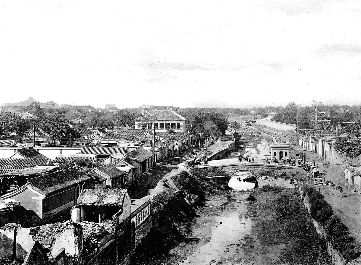 photo from Ein Tagebuch in Bildern